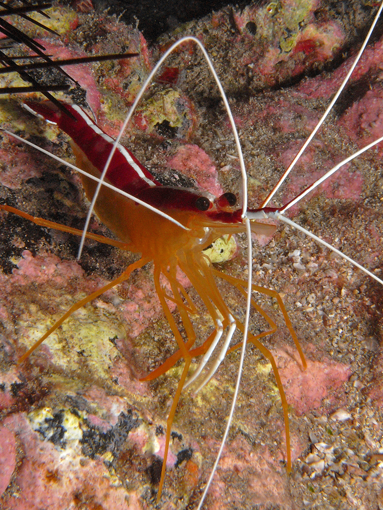 Lysmata grabhami - White-striped cleaner shrimp / Lady escarlata / Crevette barbier (crevette nettoyeuse), Tenerife.